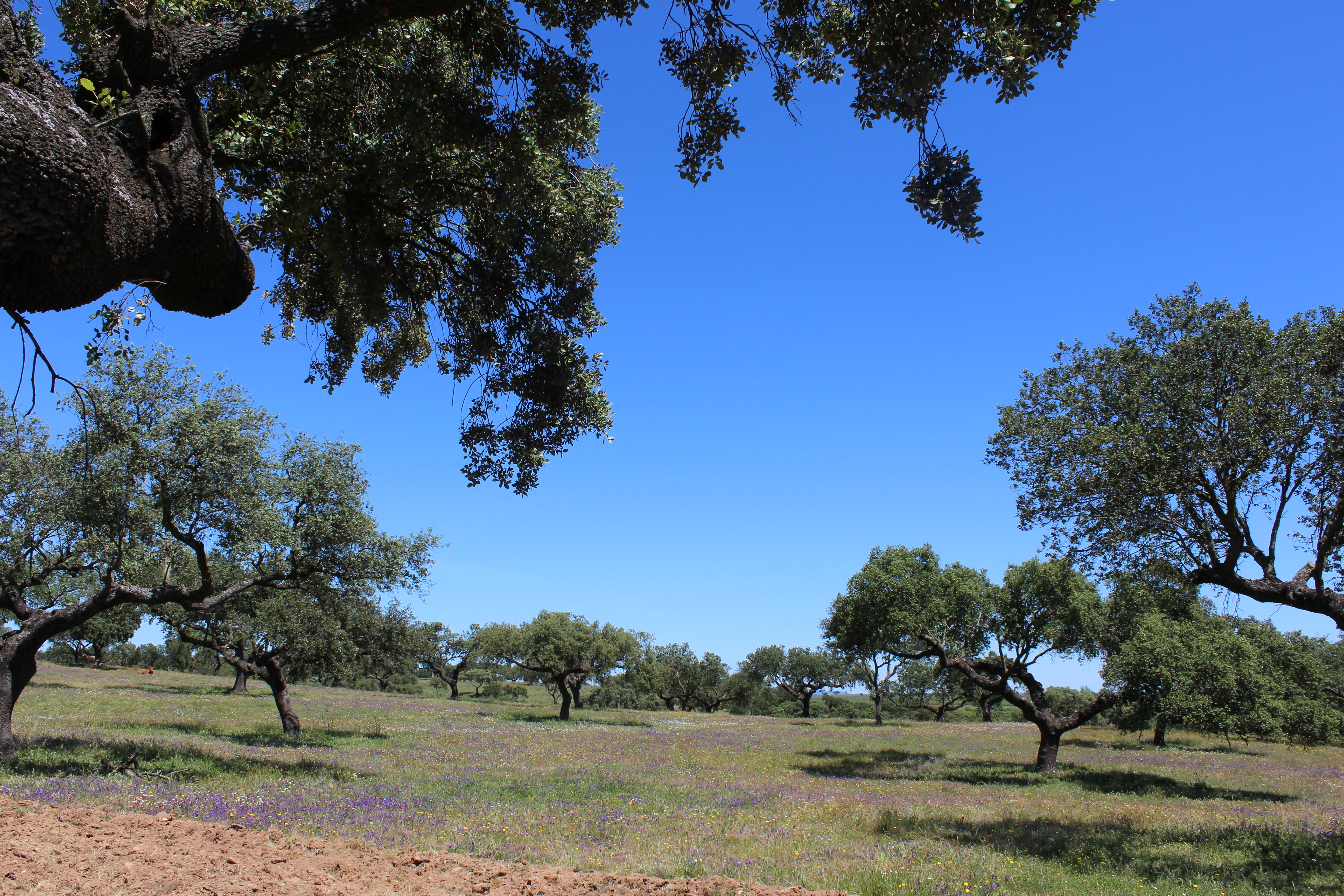 Dehesa Cabeza Rubia en Badajoz-Extremadura